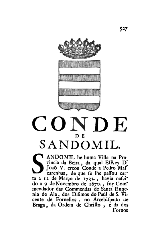 Memorias Historicas e Genealogicas dos Grandes de Portugal - Conde de Sandomil